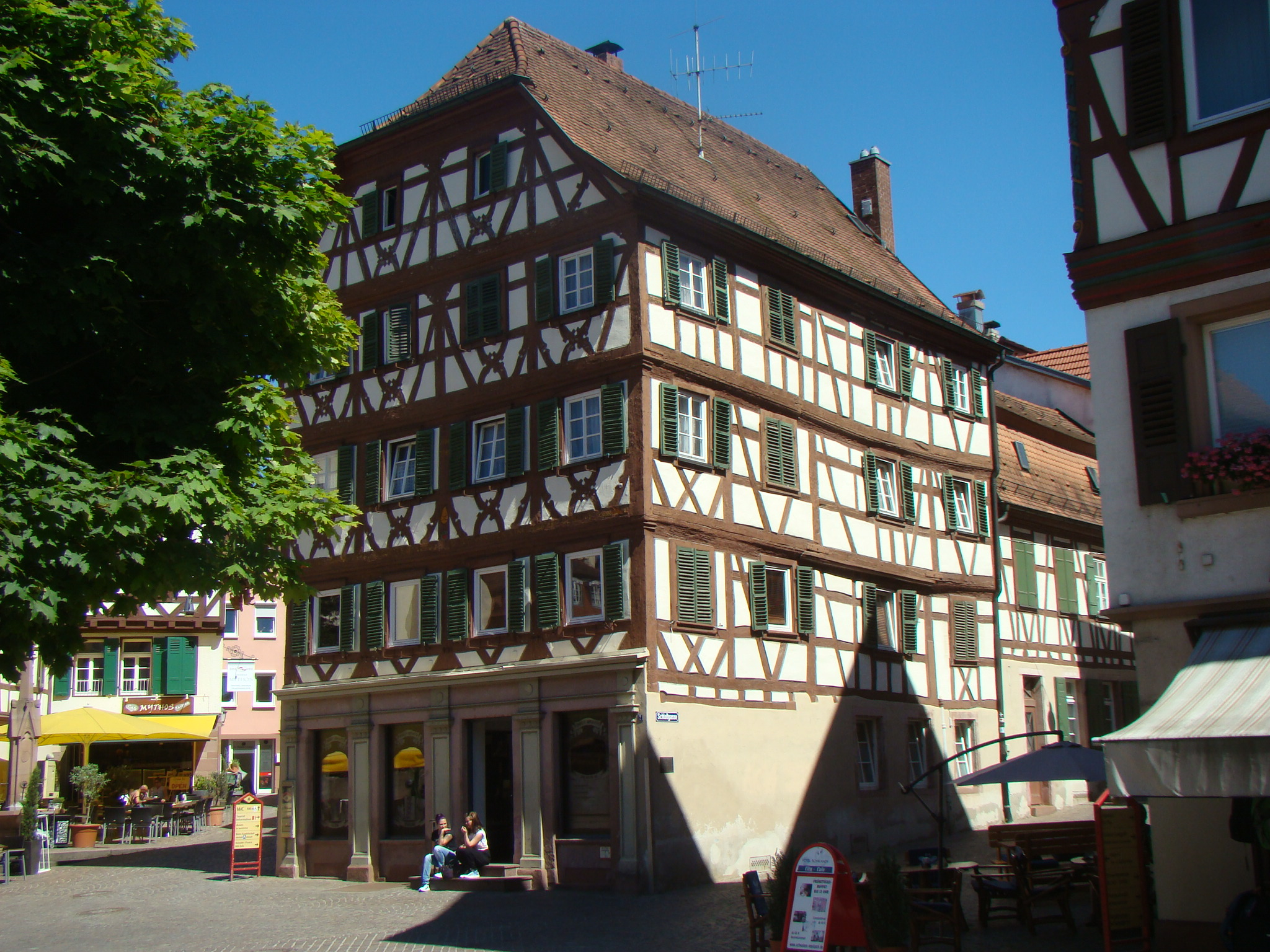 Mosbach, Haus Lindenlaub am Marktplatz